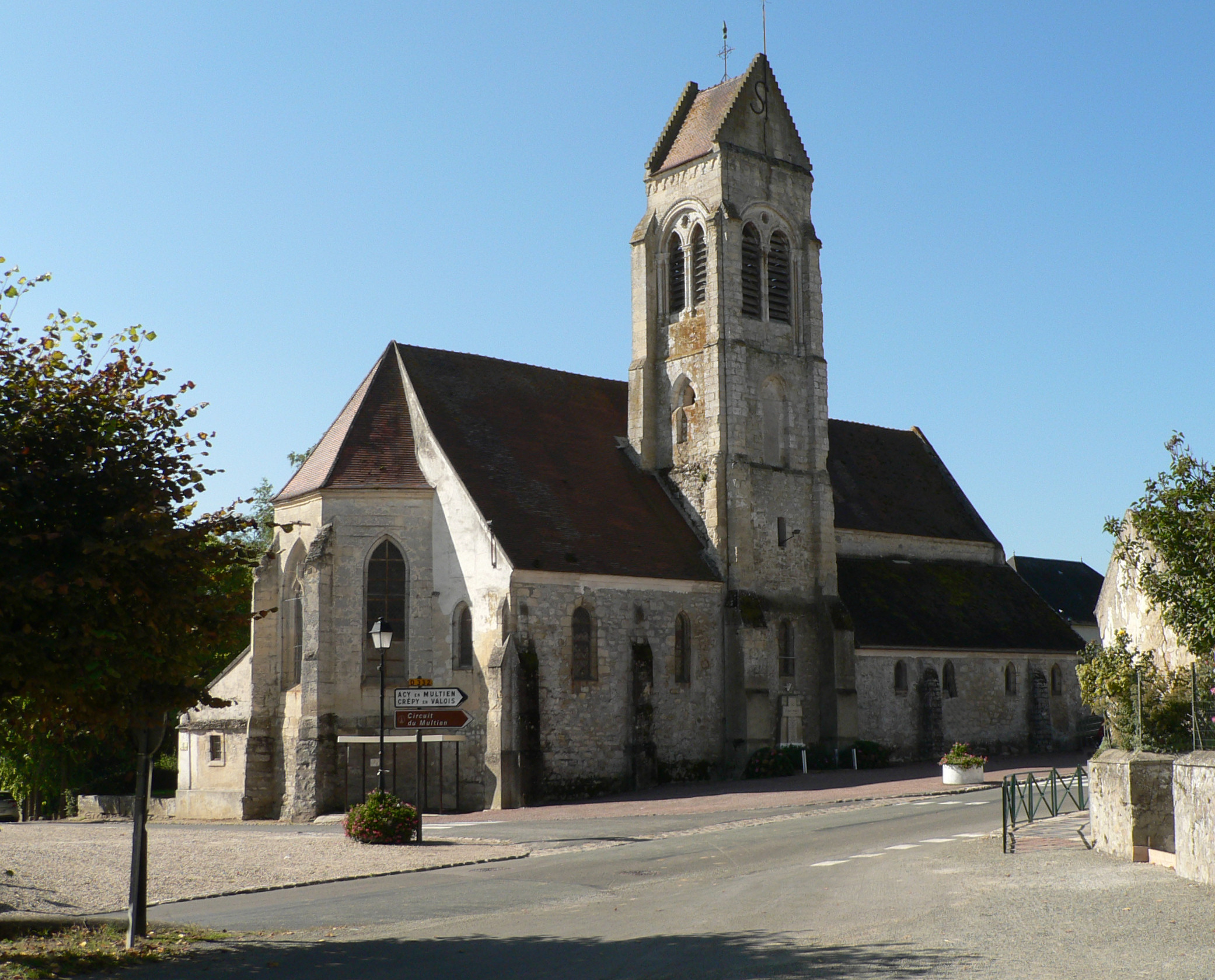 Vue d'ensemble NE